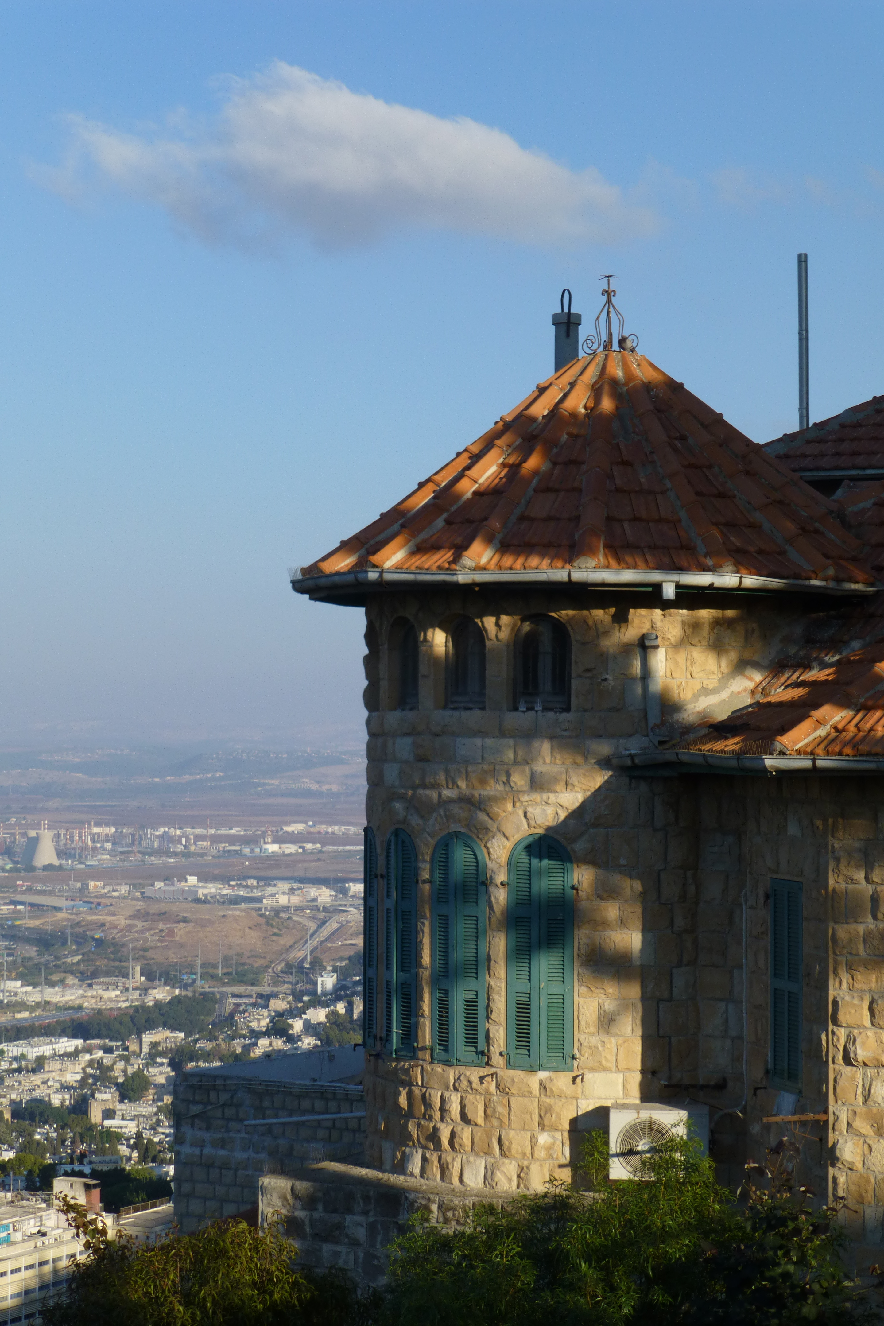 בית הטירה במרכז הכרמל בחיפה